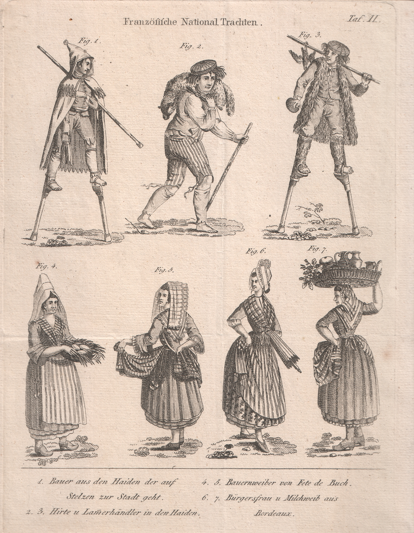 Französische Nationaltrachten. Taf. II. Lithografie. 1. Bauer aus den Haiden der auf Stelzen zur Stadt geht. 2. 3. Hirte und Lammerhändler in den Haiden. 4. 5. Bauernweiber von Fete de Buch. 6. 7. Bürgersfrau u. Milchweib aus Bordeaux.